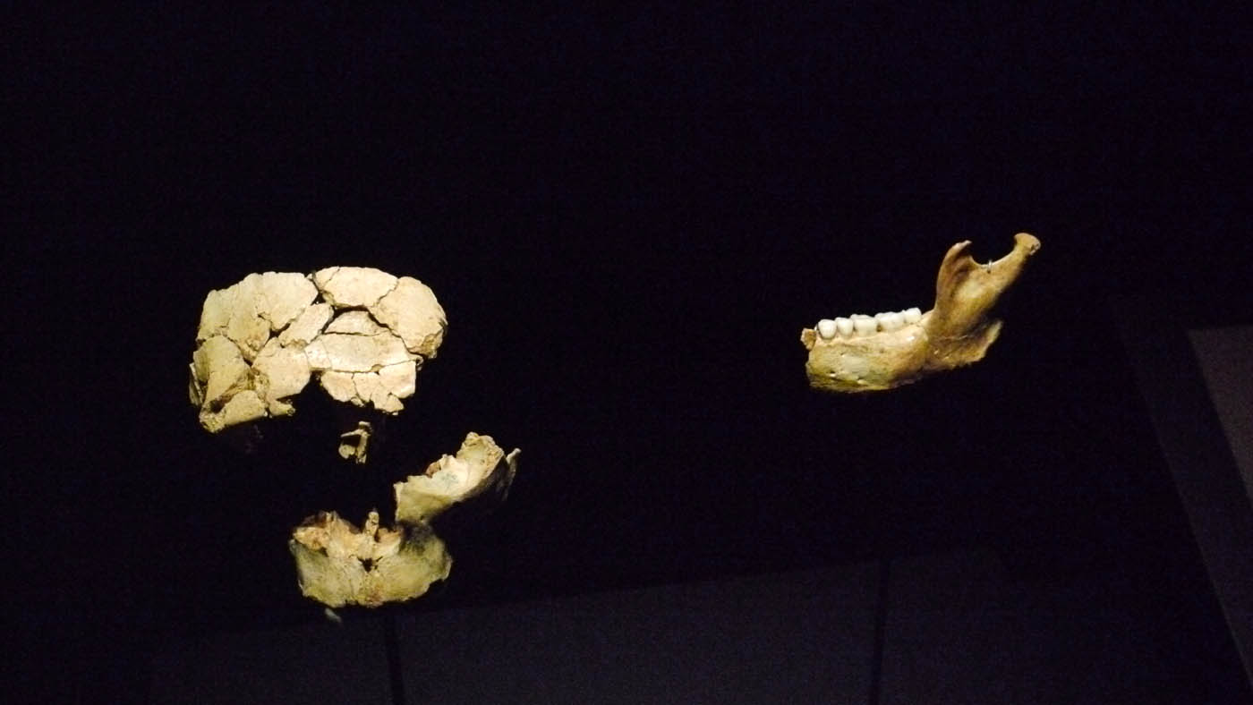 Restos originales del Homo antecessor en el Museo de la Evolución Humana de Burgos. ATD6-15 y ATD6-69 a la izquierda (Niño de la Gran Dolina) y hemimandíbula ATD6-96 a la derecha.